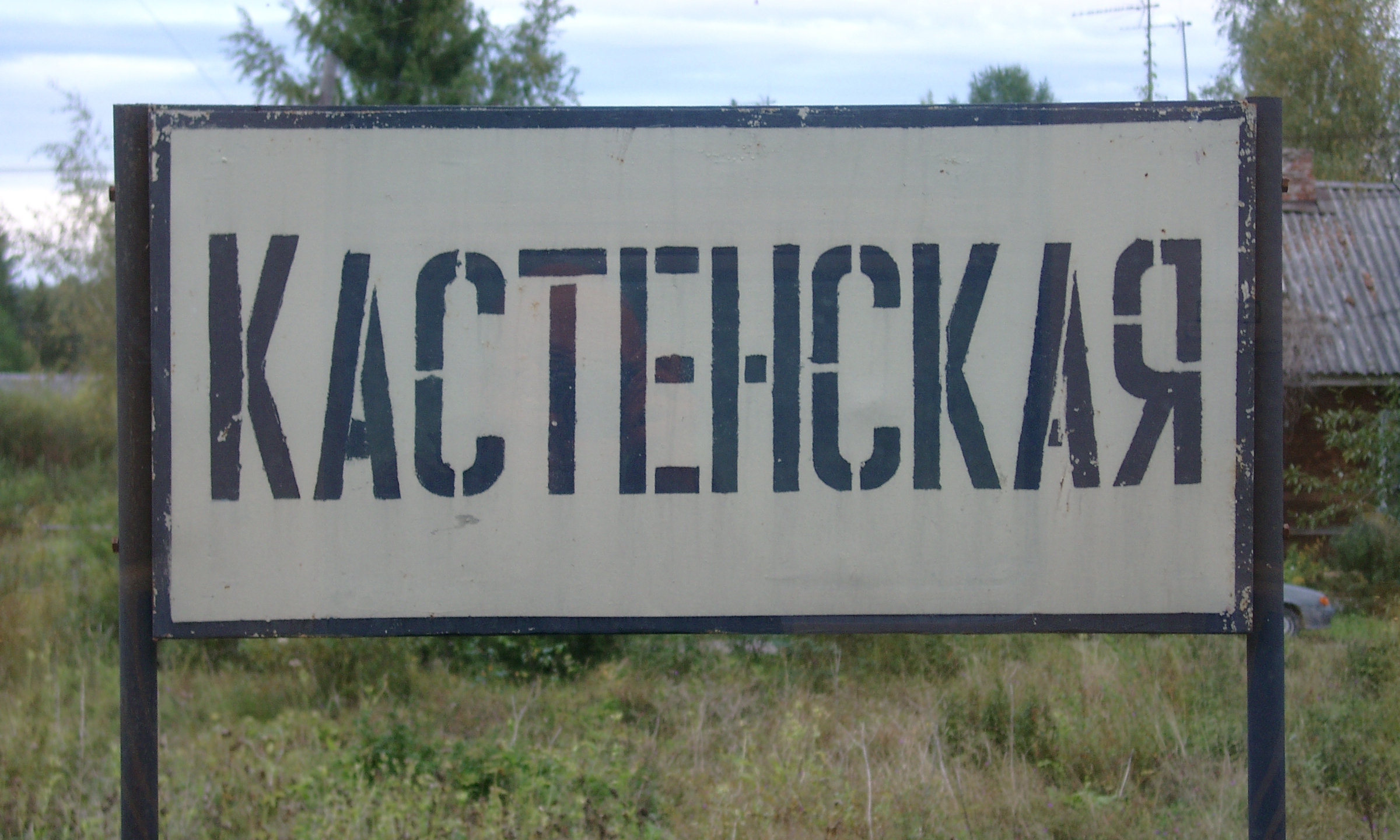 Железнодорожная платформа Кастенская. Ленинградская область, Россия. Указатель с названием